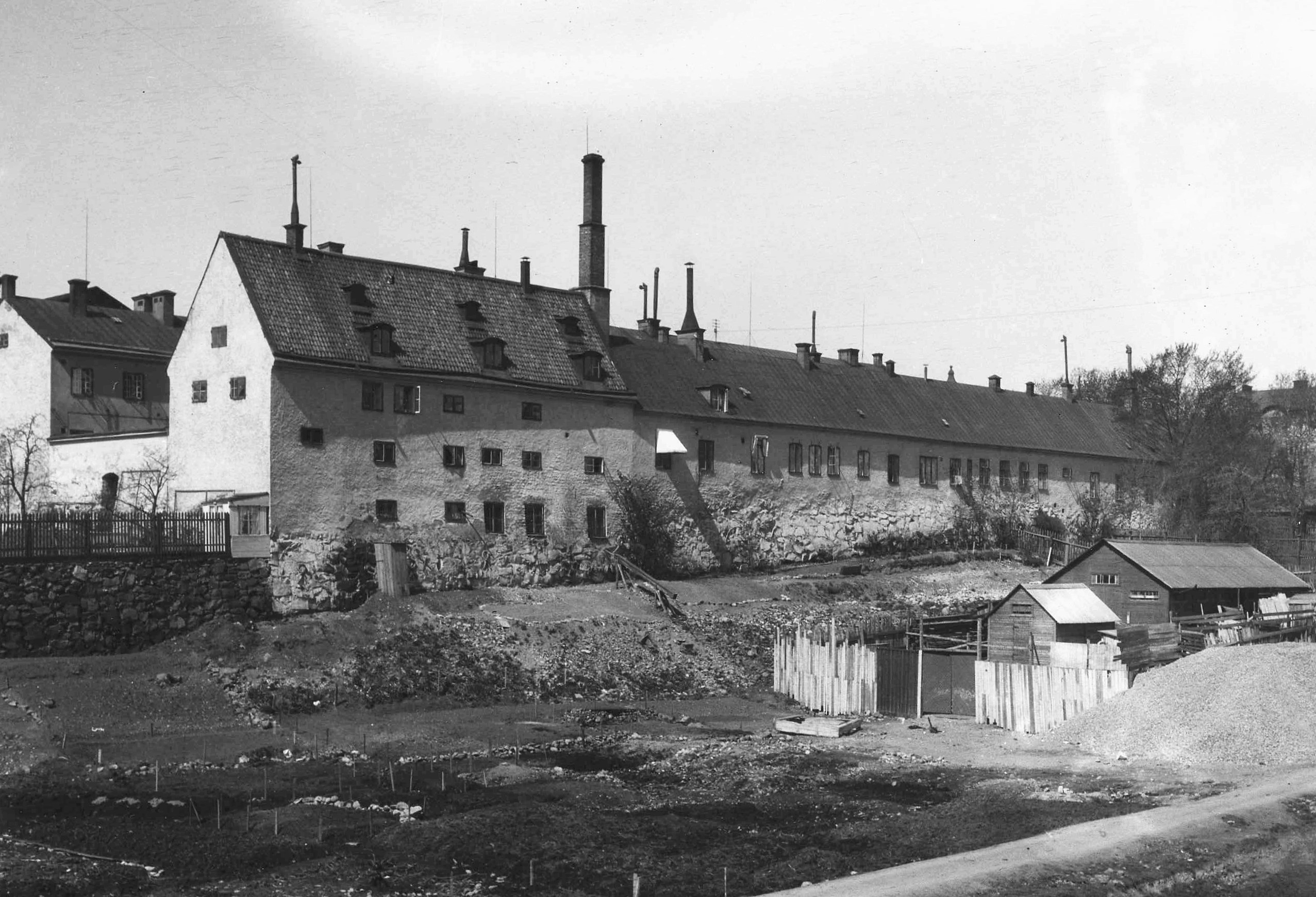 Östra sidan av Katarina sjukhus sett från Södermannagatan